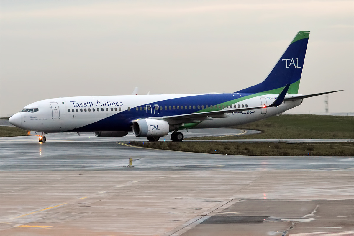 Tassili Airlines, 7T-VCC, Boeing 737-8ZQ